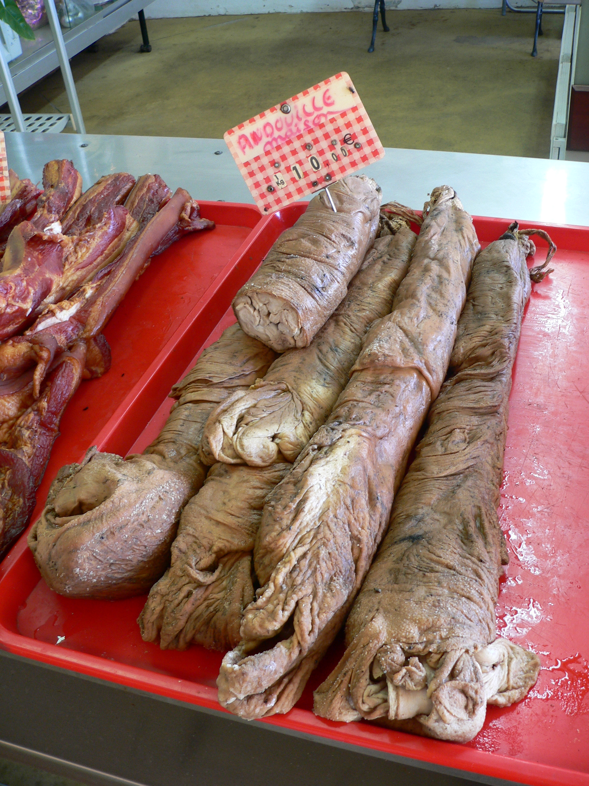 Andouille créole from Réunion Island